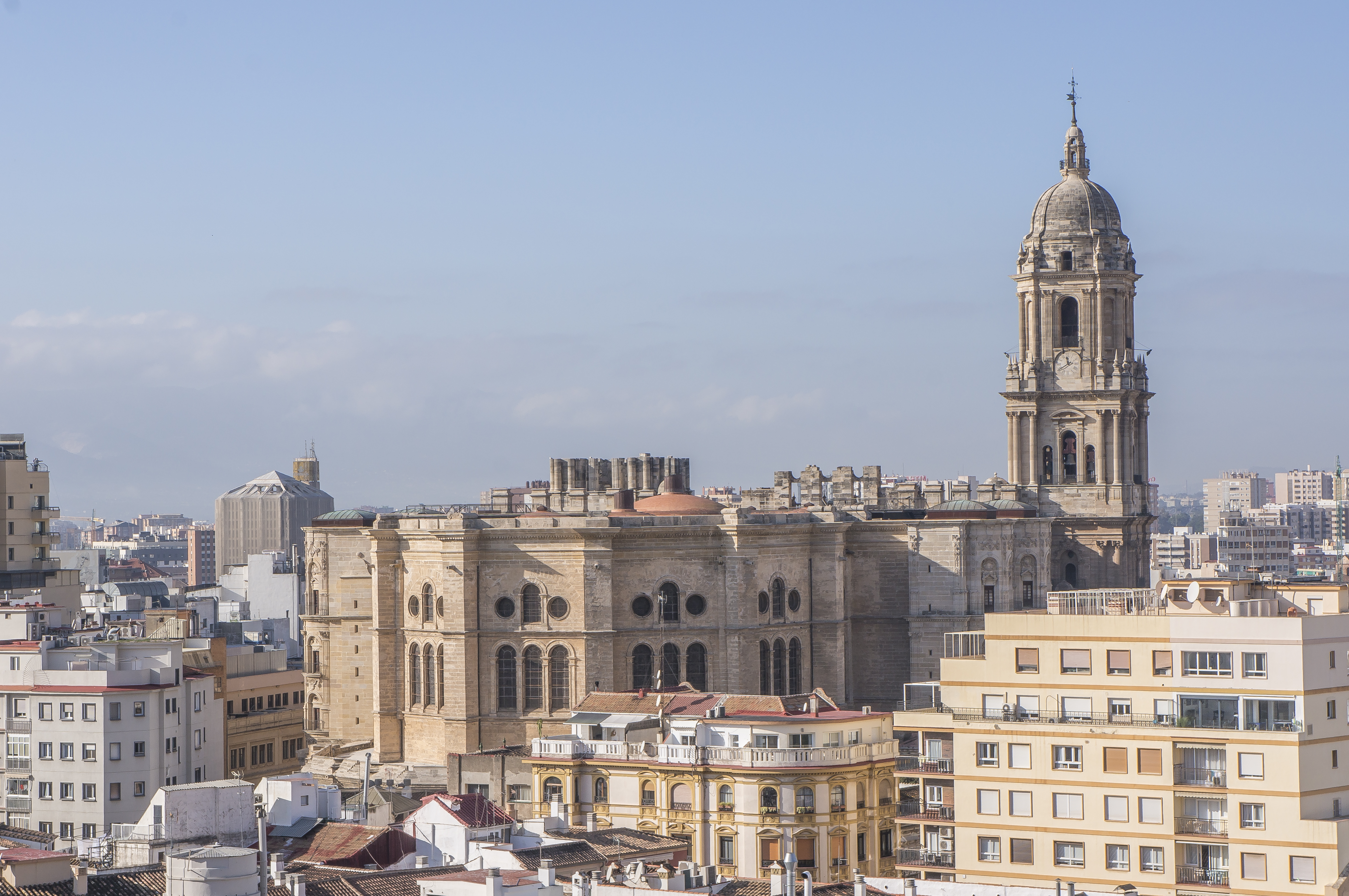 Catedral de Málaga.